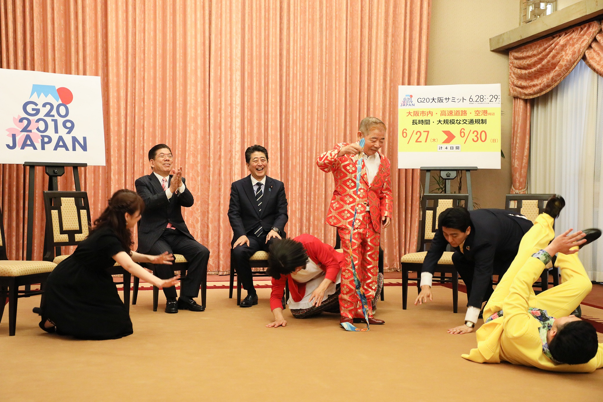 吉本新喜劇メンバー一行によるＧ２０大阪サミット関連の表敬